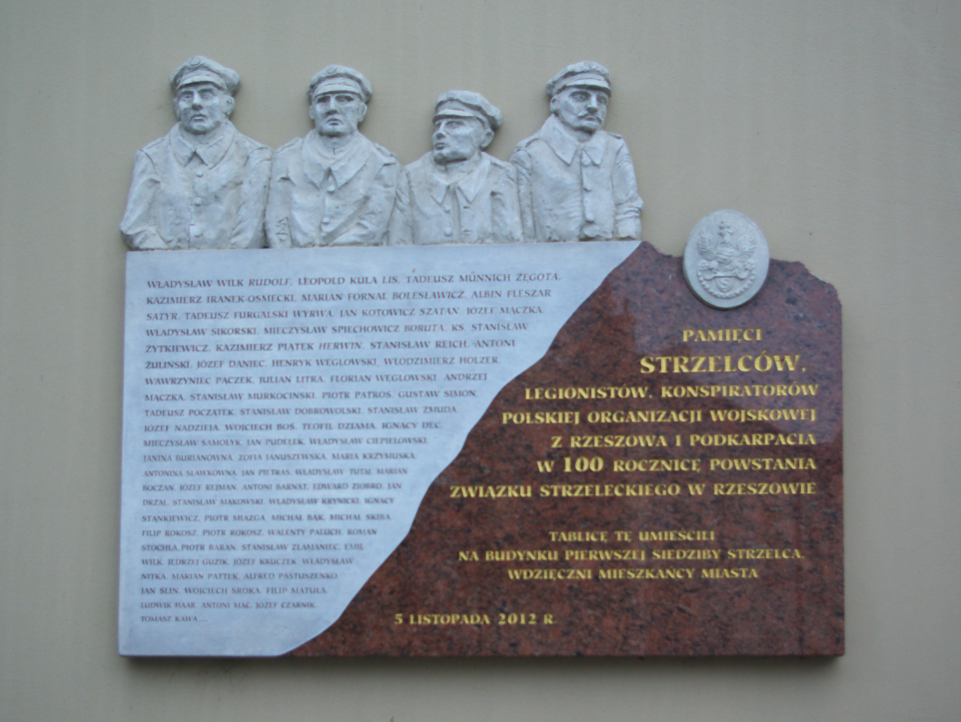 Budynek przy ul. 3 Maja 23 w Rzeszowie. Tablica upamiętniająca członków Związku Strzeleckiego